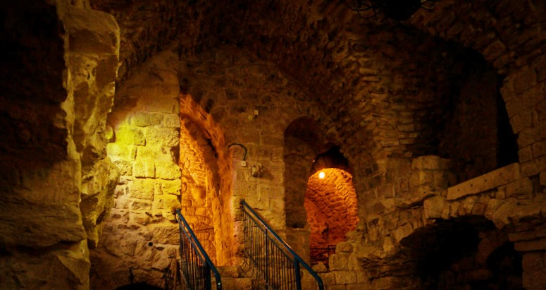 לבנות ולהבנות, צפת